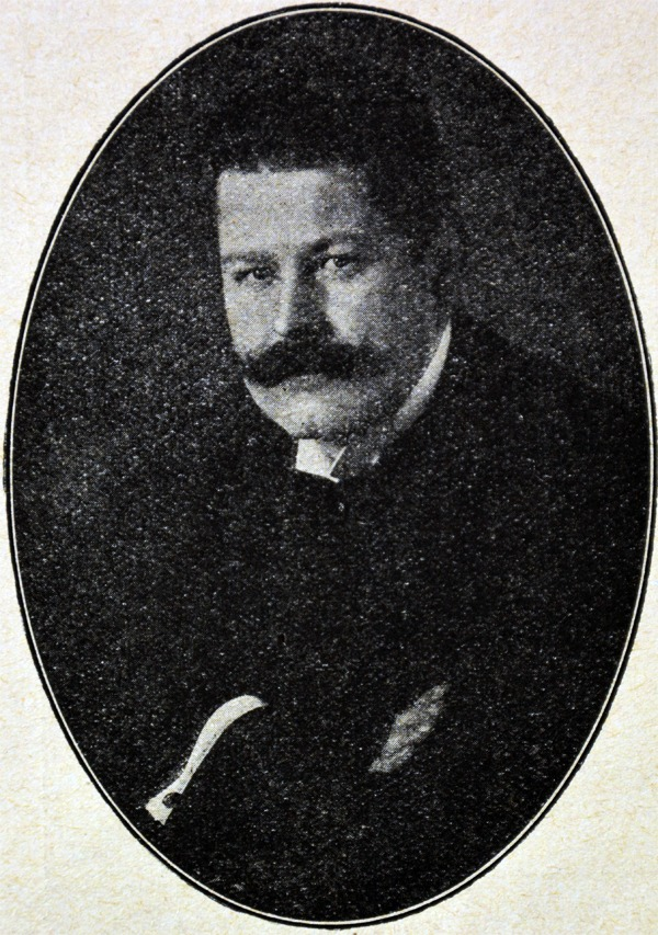 Otto Kockert, Komponist